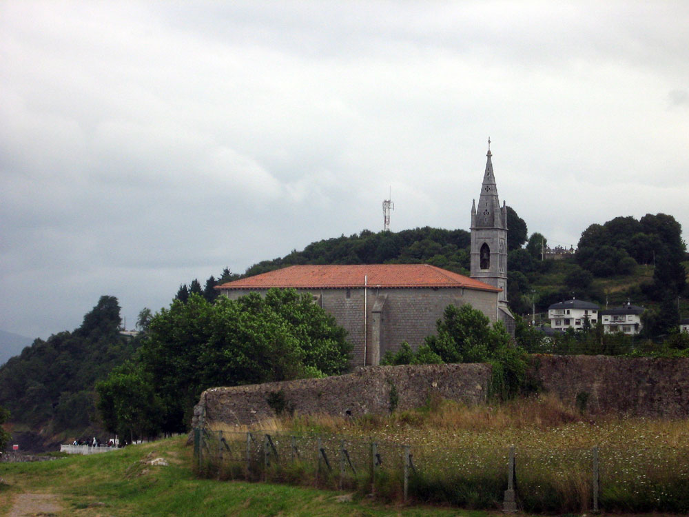 Iglesia de Santa Maria de Mundaka vista desde la Ermita de Santa Catalina.